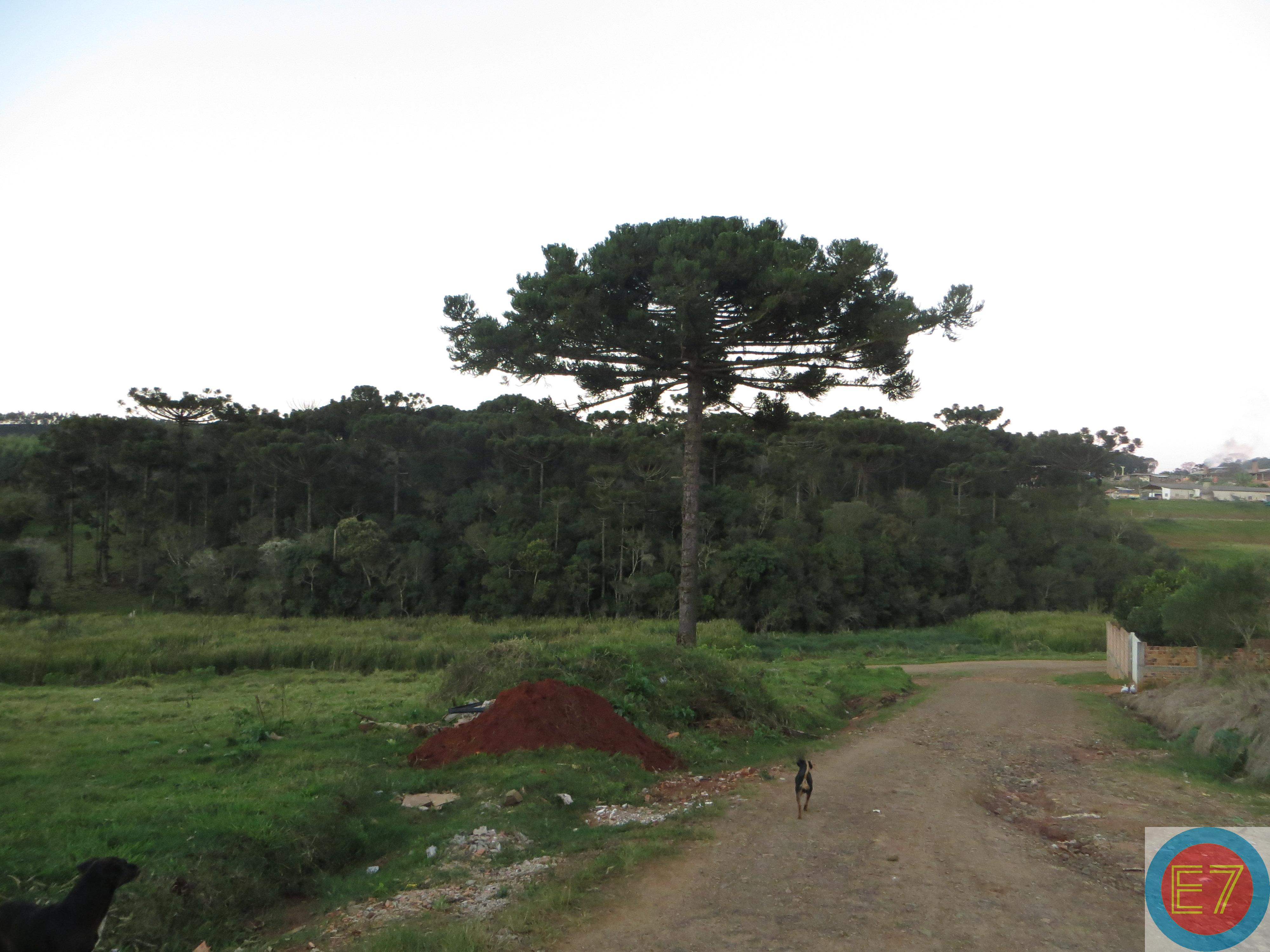 Remanescente de Araucária angustifolia em Curiúva, Estado do Paraná, Brasil.